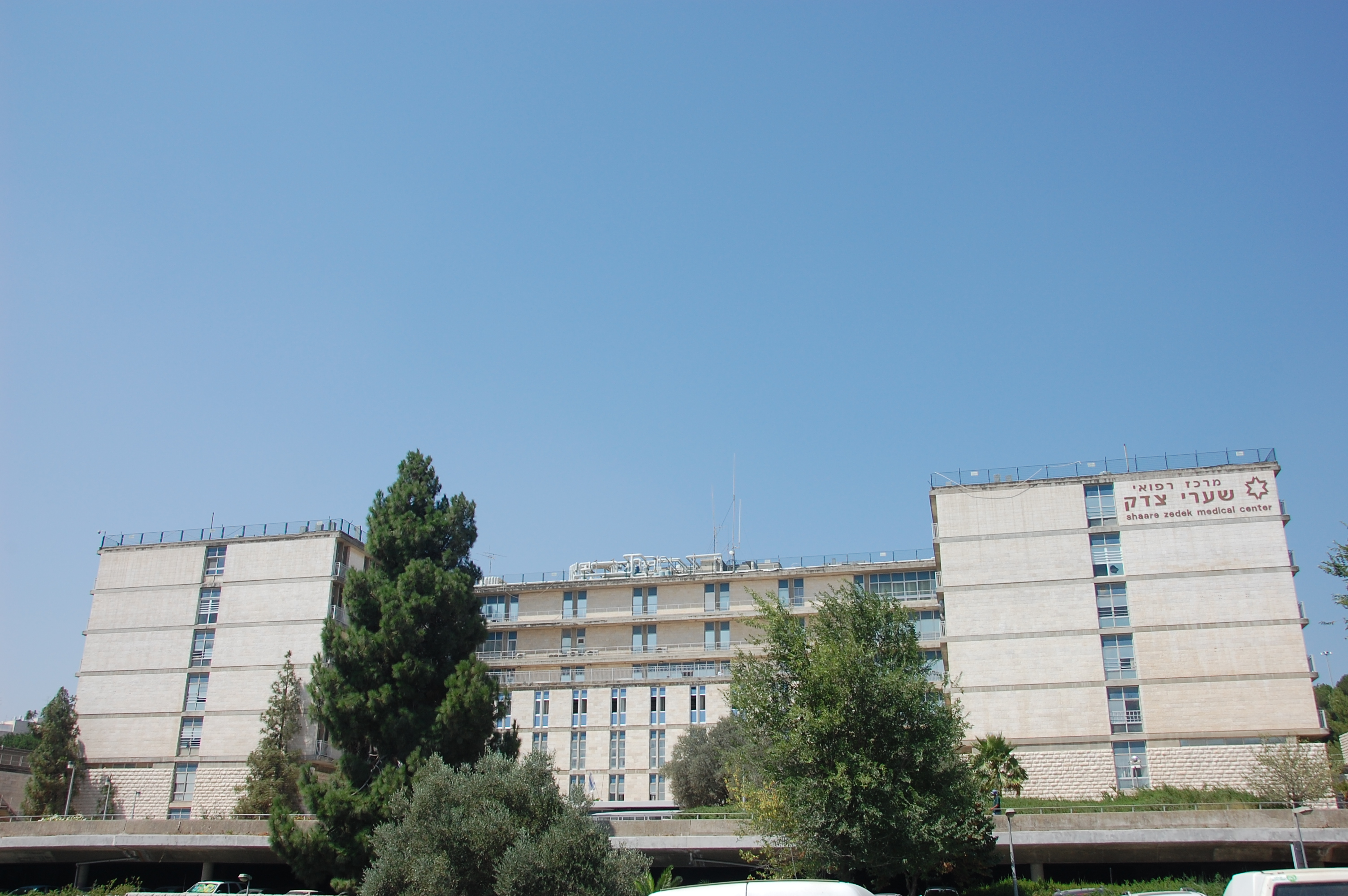 new shaarey zedek